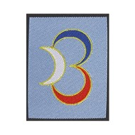 insigne de la 3°BM